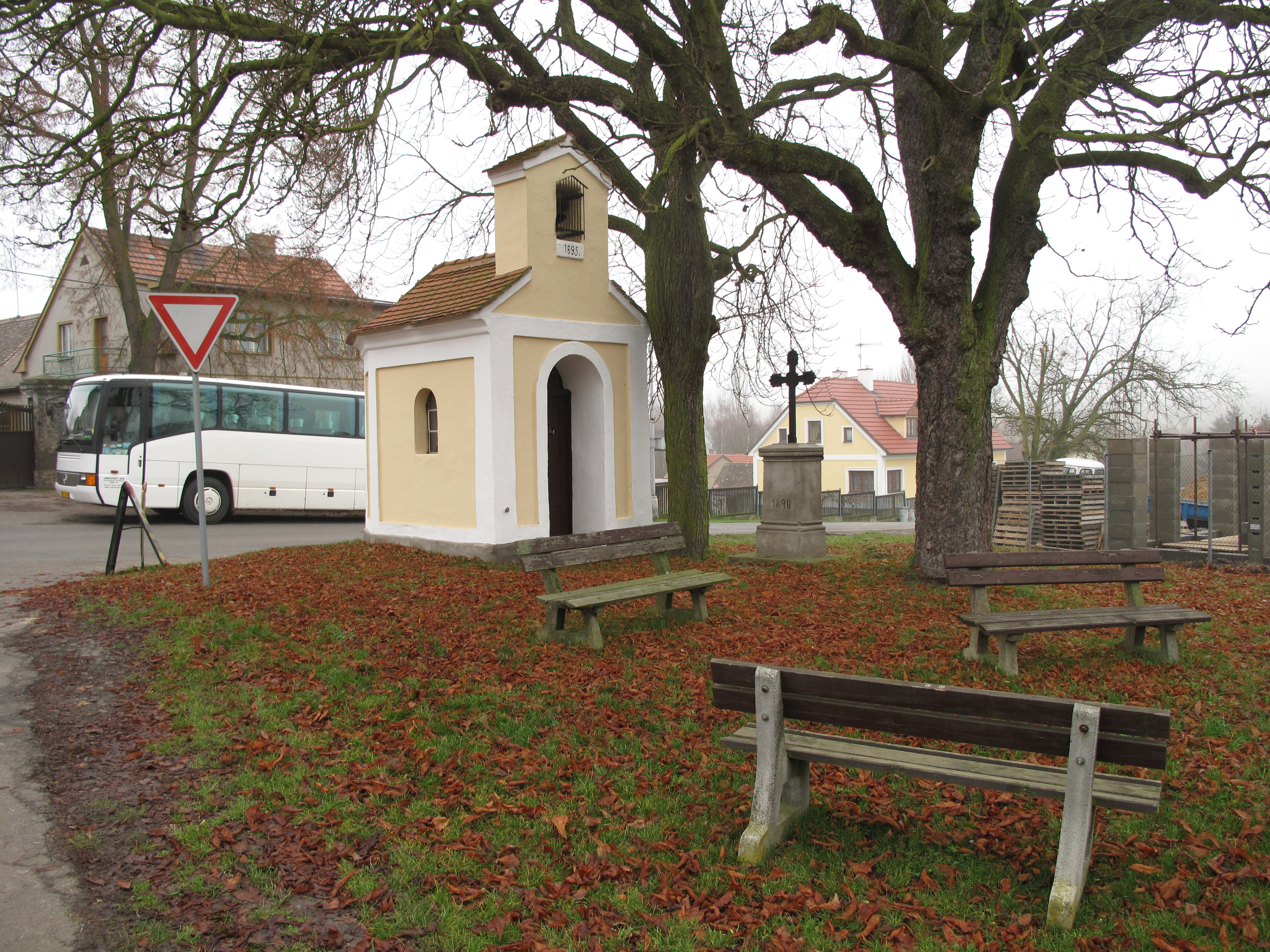 Kaplička ve Vašírově. Okres Kladno, Česká republika.